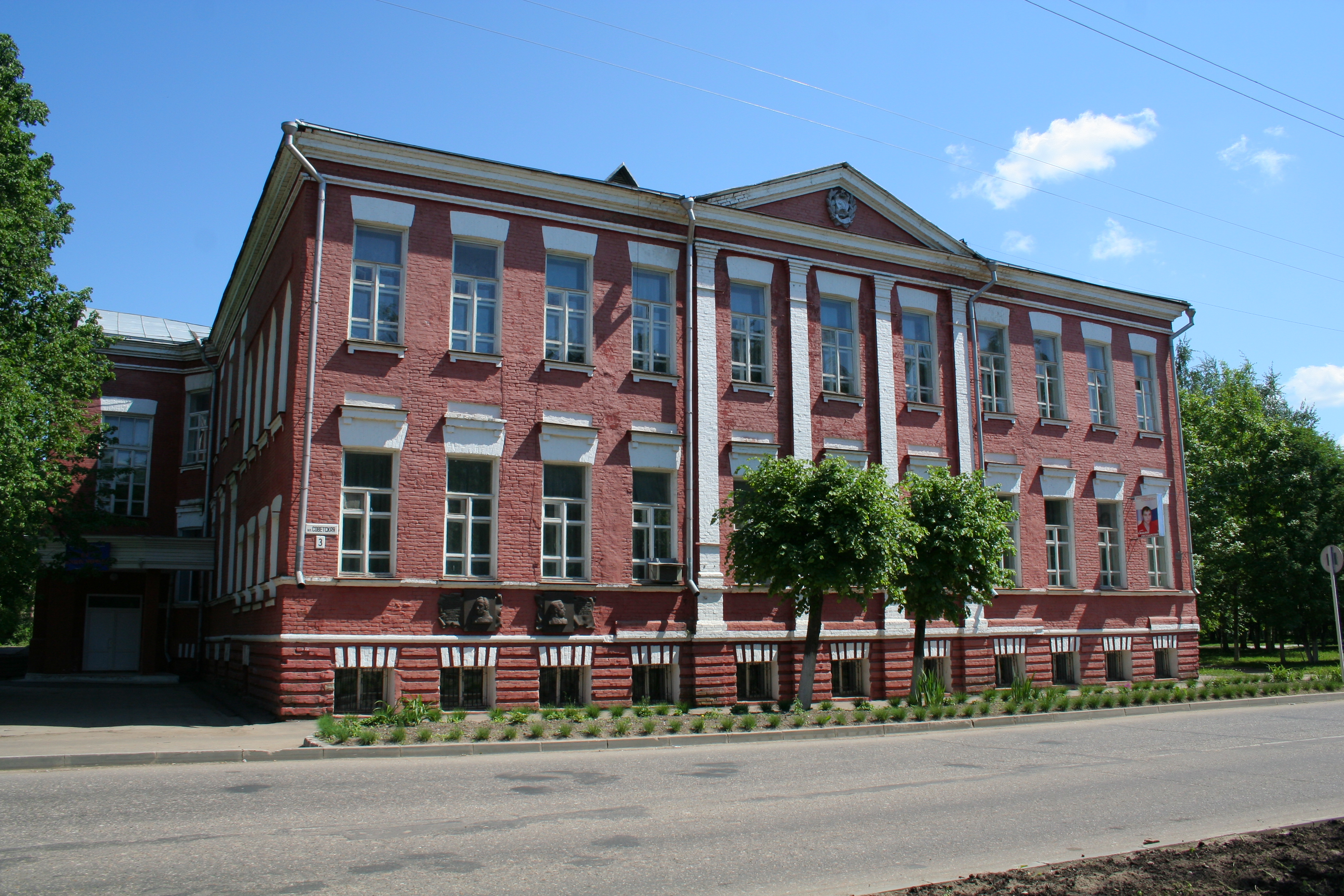 Stadt Gagarin (ehem. Gschatsk), Oblast Smolensk, Russland. Ehemaliges Haus des Kaufmanns Zerewitinow. War später eine Schule, auf die auch Juri Gagarin ging.